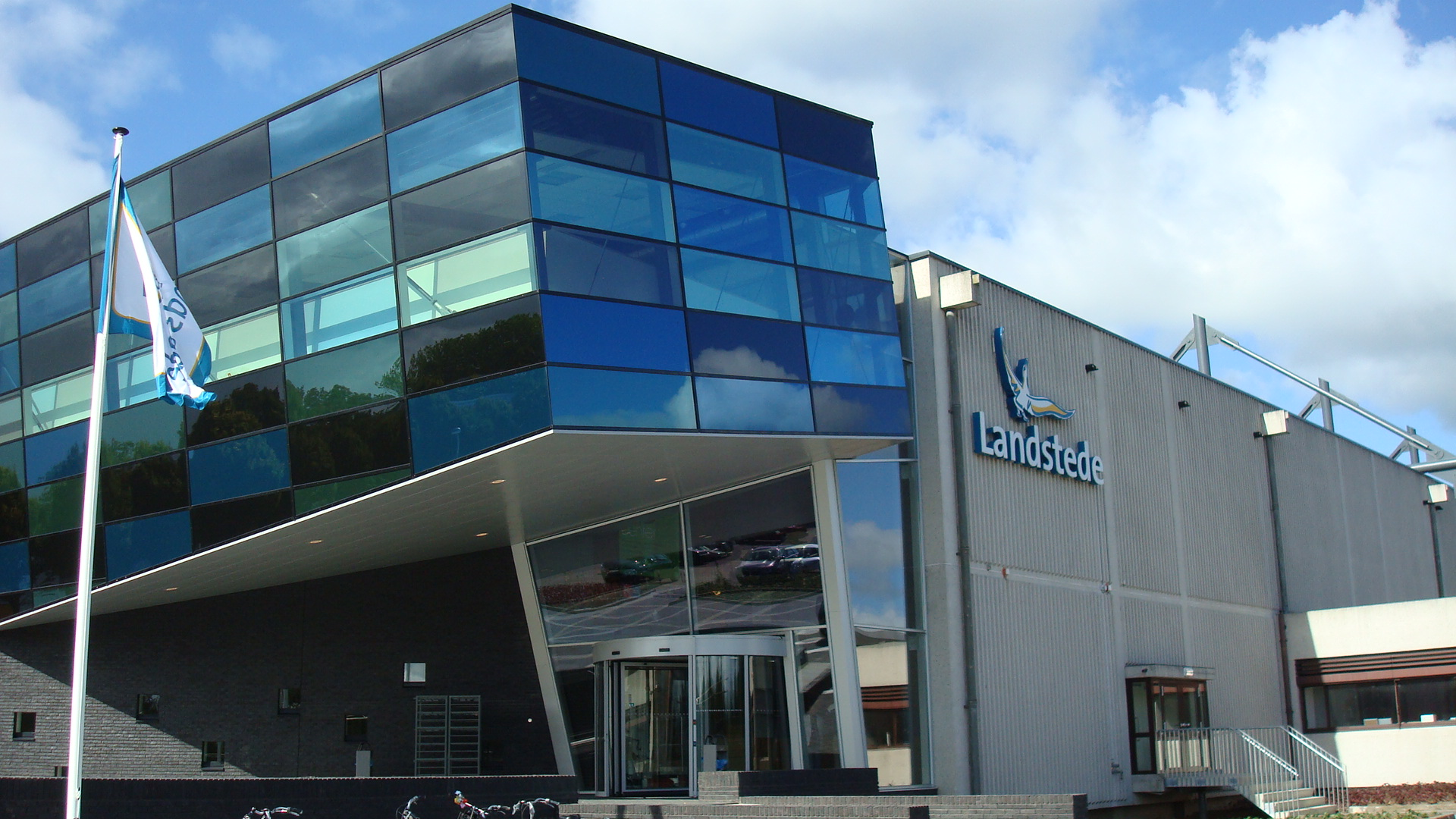 Landstede Topsportcentrum in Zwolle